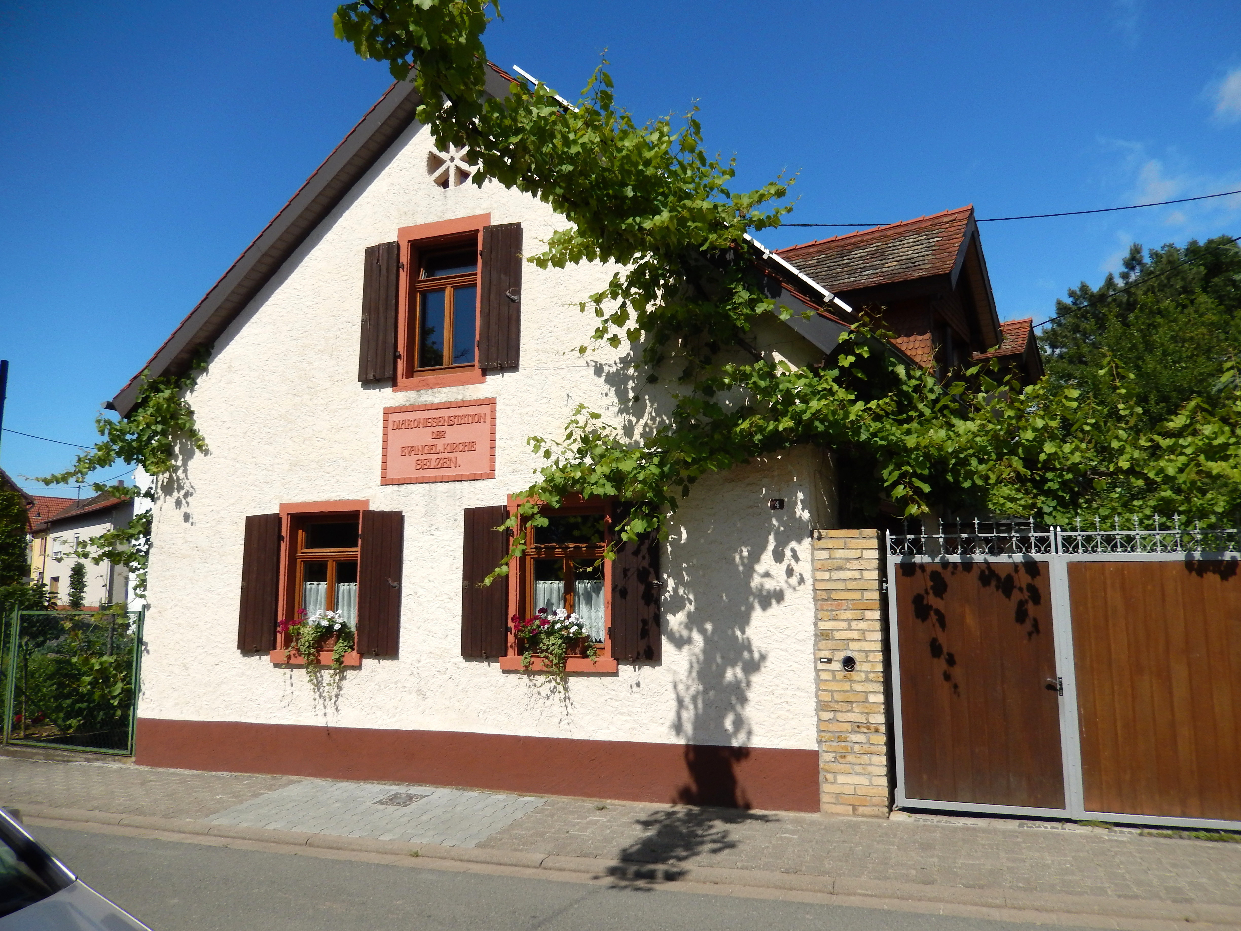 Historische Diakonissenstation der evangelischen Kirche Selzen